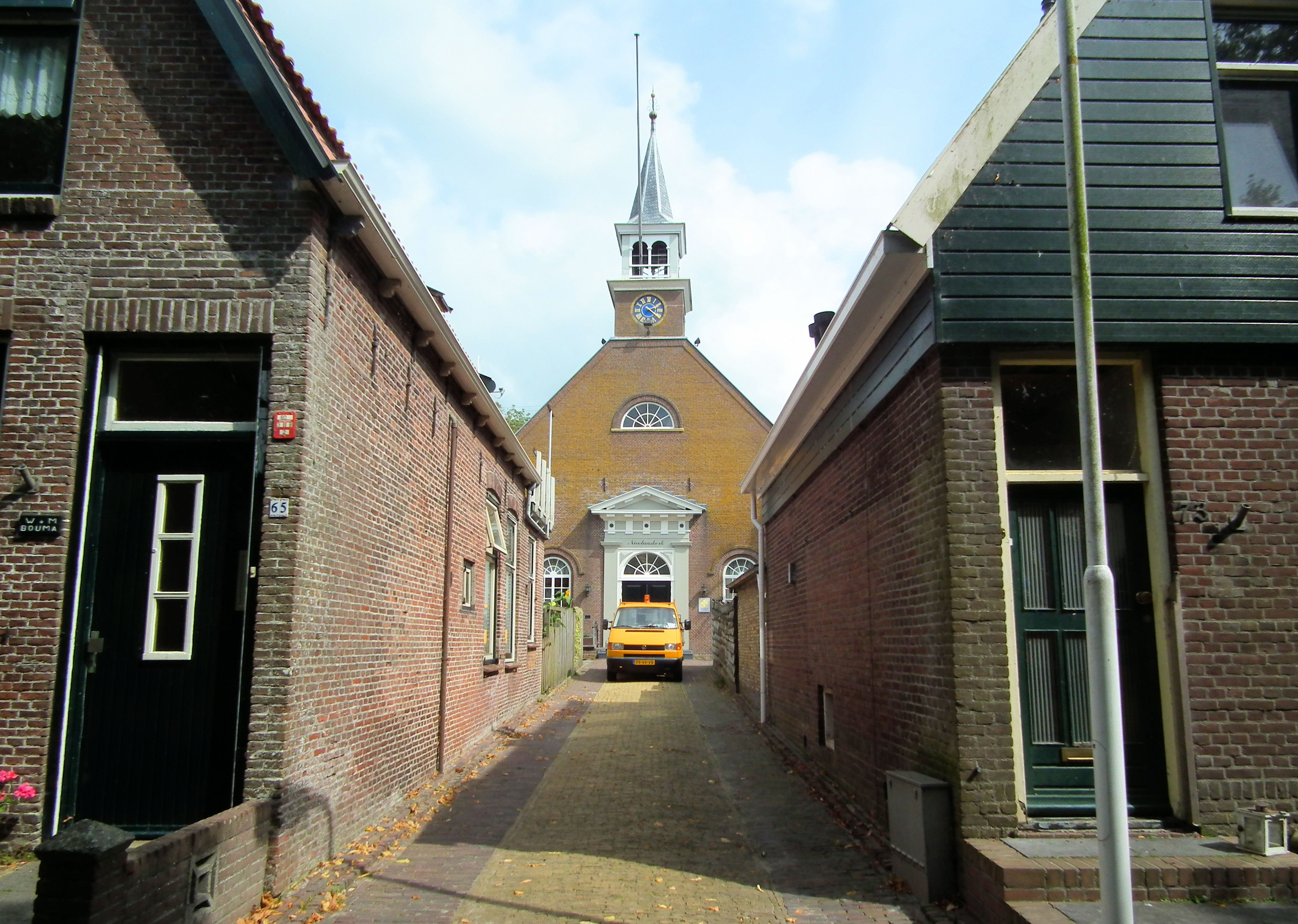 Nederland - Friesland - Stavoren - Stavoren is Hanzestad en Frieslands oudste stad. Pittoreske grachtjes. Een aantal fraaie panden.